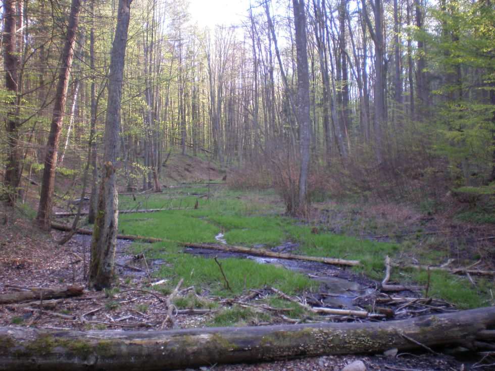 Rezerwat przyrody Cisowa - rzeka Cisówka blisko Źródeł